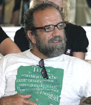 ph: Alberto Macaluso